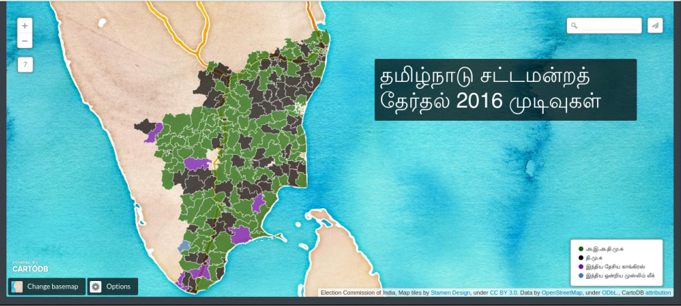 தமிழ்நாடு சட்டமன்றத் தேர்தல் 2016 - தொகுதி வாரி முடிவுகள். This map may be incomplete, and may contain errors. Don't rely solely on it for navigation.